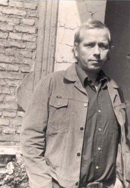 Der deutsche Schriftsteller Nicolas Born (1937-1979)1972 in Berlin Friedenau